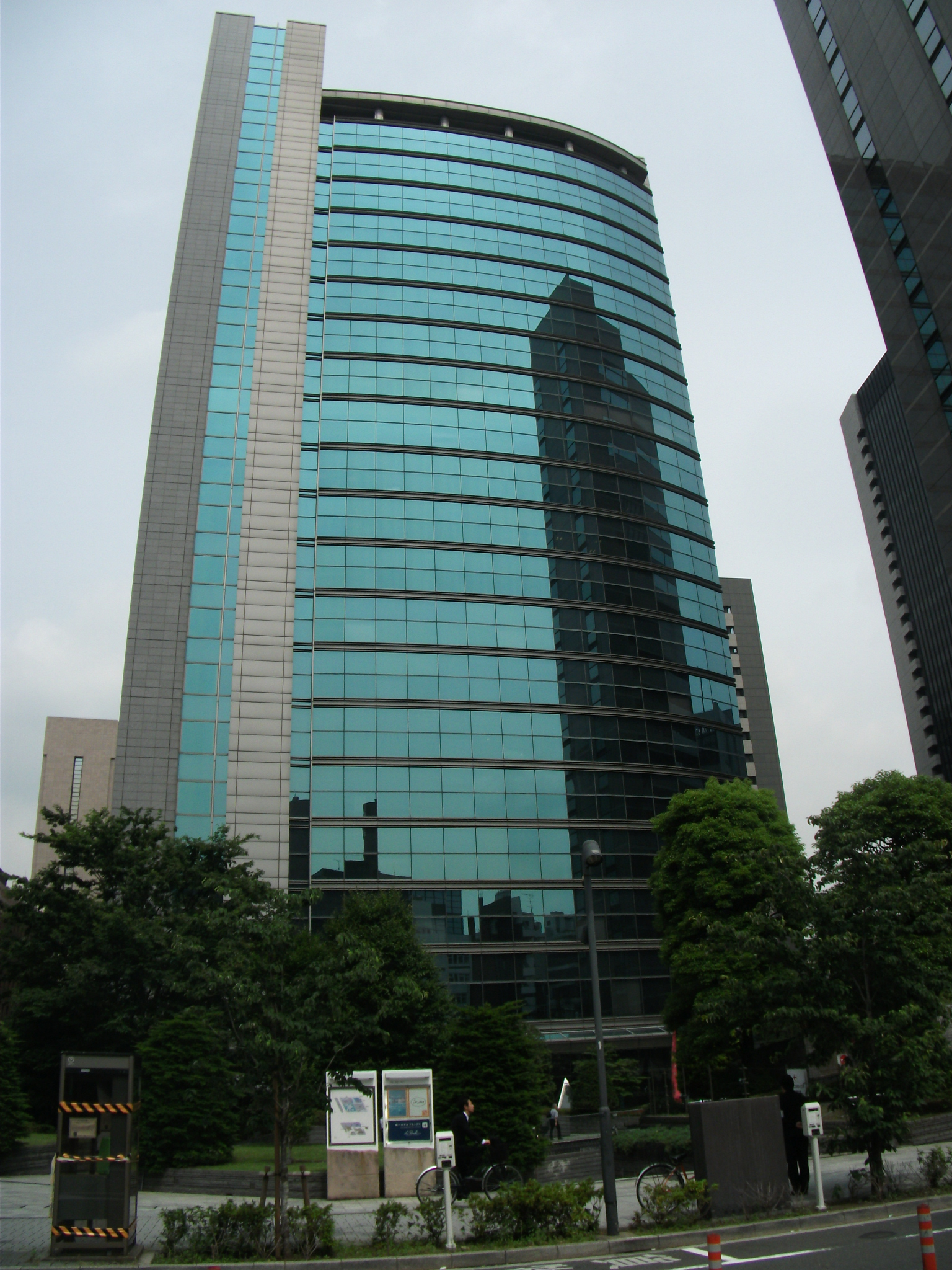 東京都千代田区内幸町、新幸橋ビル